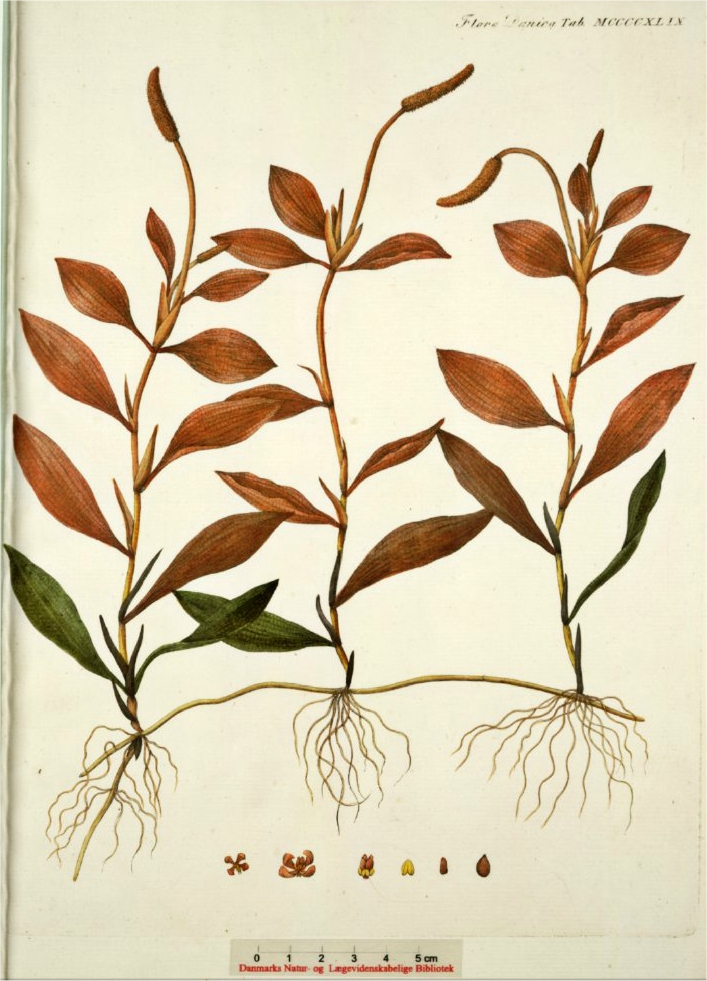 Potamogeton coloratus,_weegbreefonteinkruid